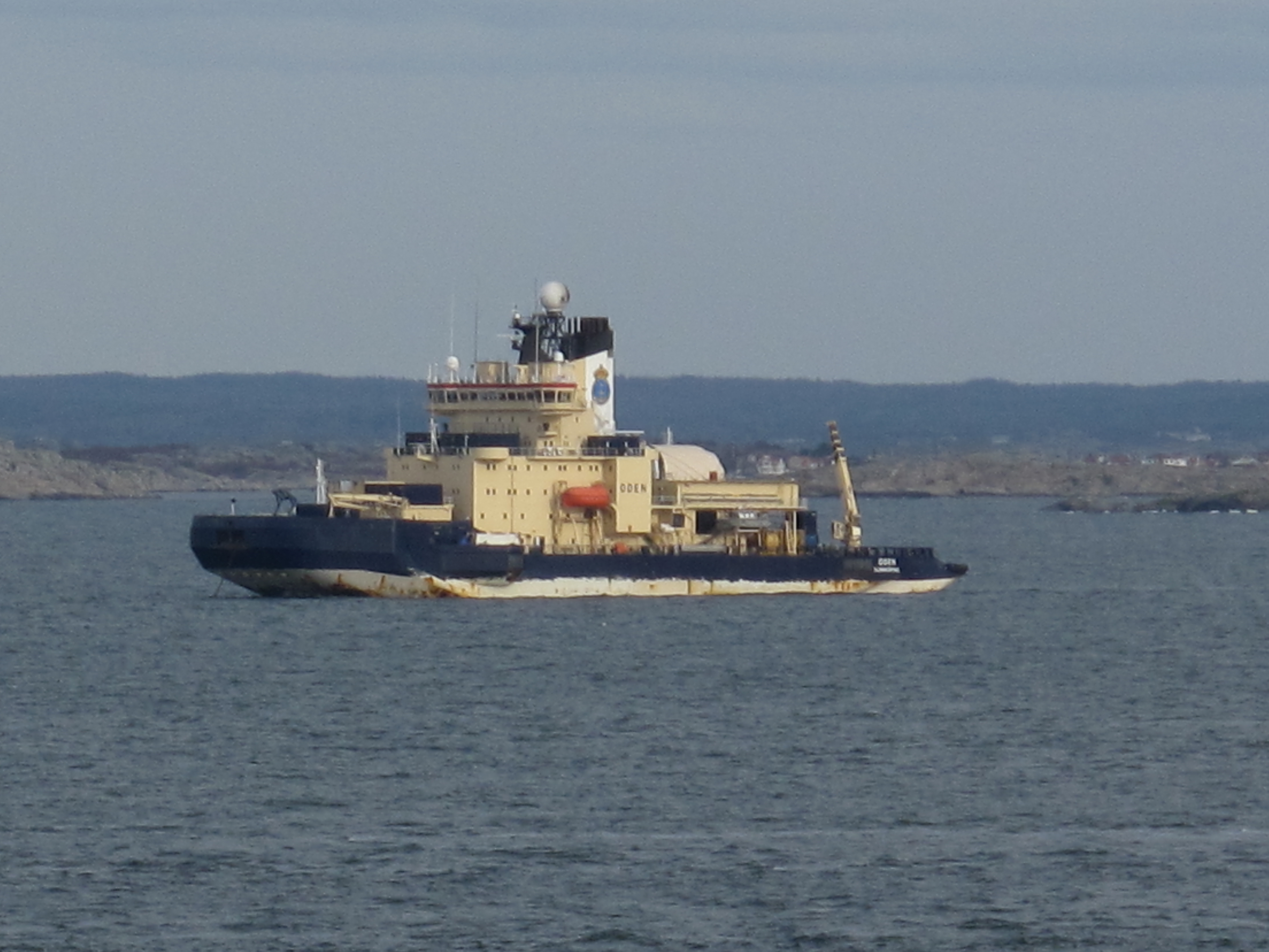 Isbrytaren Oden för ankar utanför Göteborgs hamn 2011.